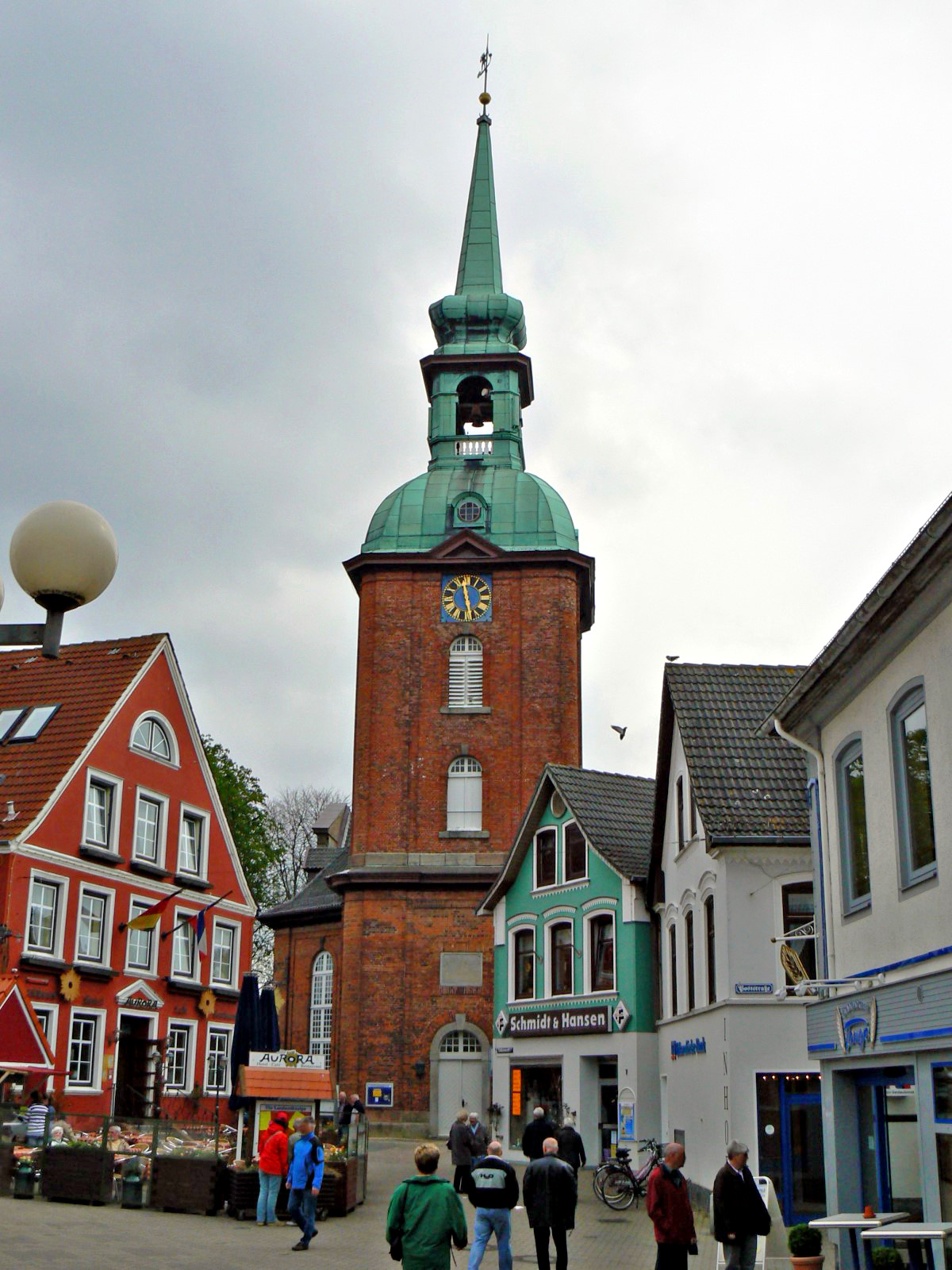 Blick über den Rathausmarkt auf die St. Nicolai-Kirche in Kappeln. Erbaut: zwischen 1789 und 1793.